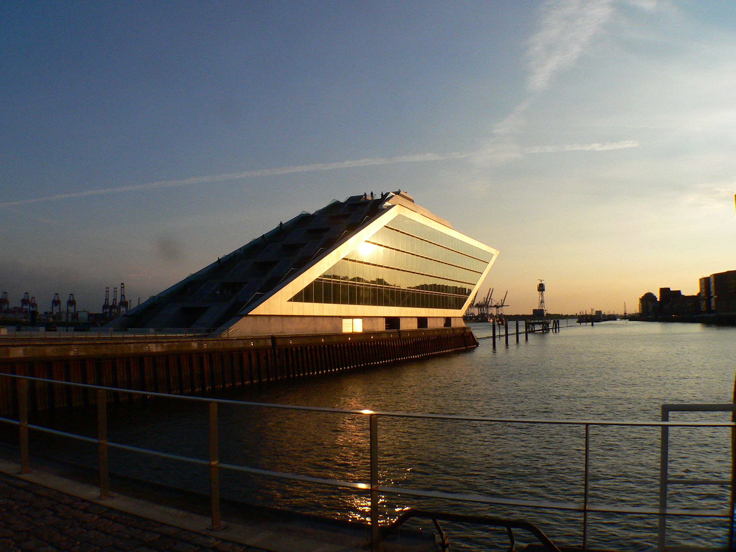 "Dockland" im Hamburger Hafen am Ausrüstungskai (Große Elbstraße)